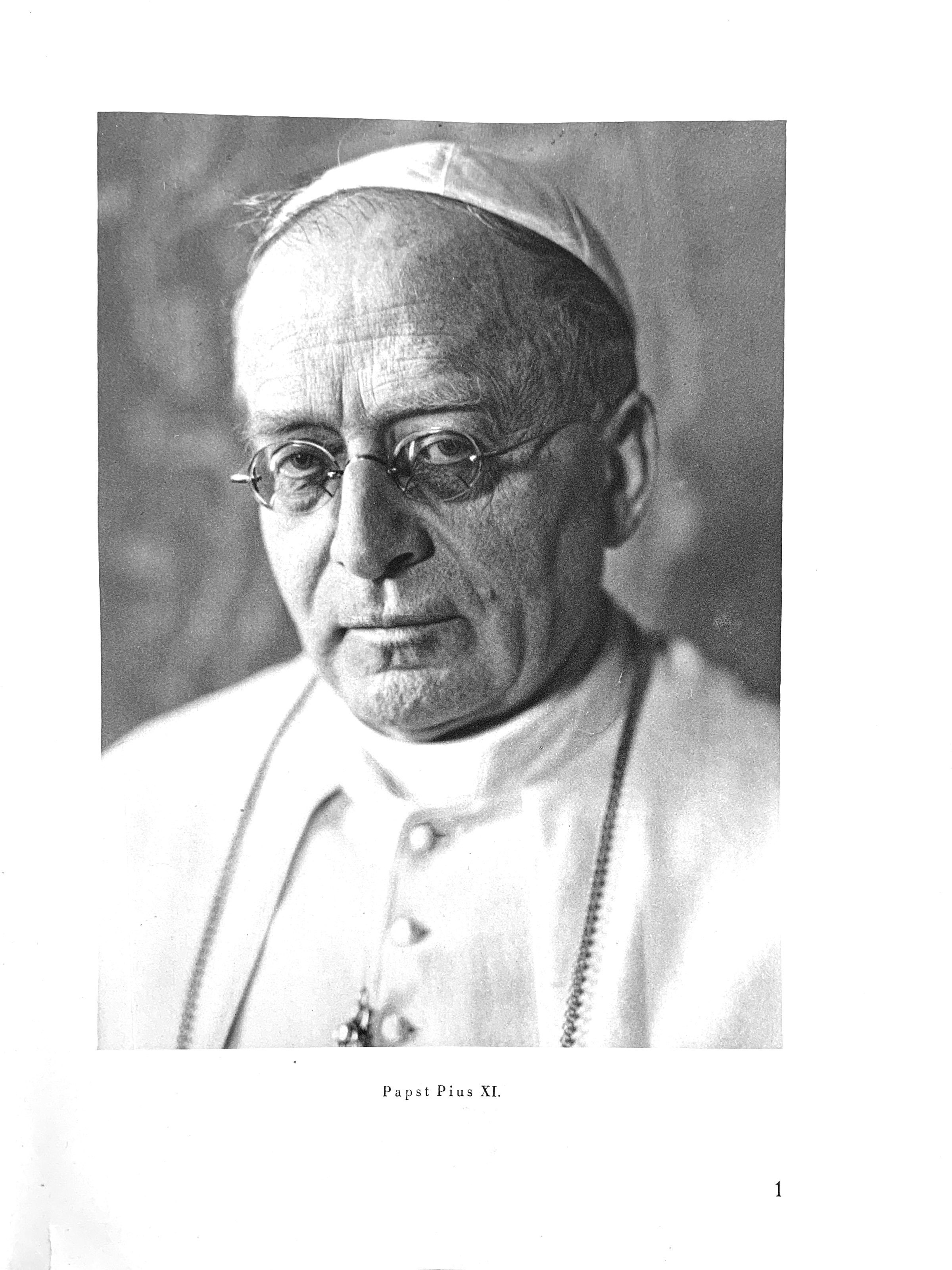 Malina, J.B. - Orbis Catholicus, 1 (Papst Pius XI.)